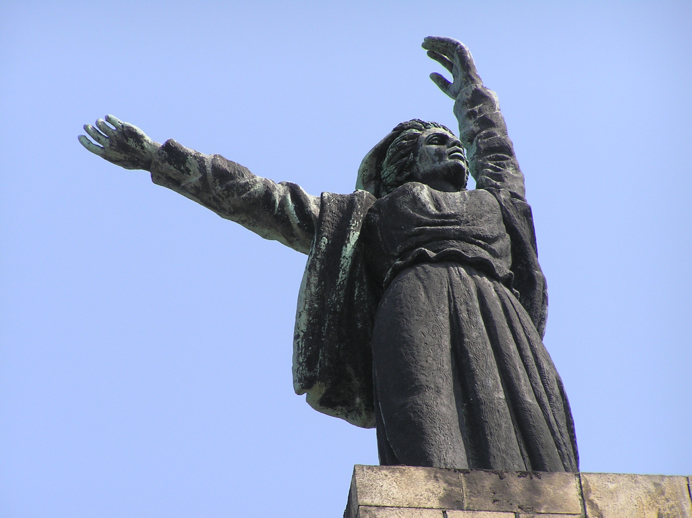 Ово је фотографија заштићеног природног добра у Србији под шифром: НП01 This is a a photo of a natural area in Serbia with ID: НП01 Fruška gora - spomenik na Iriškom vencu.